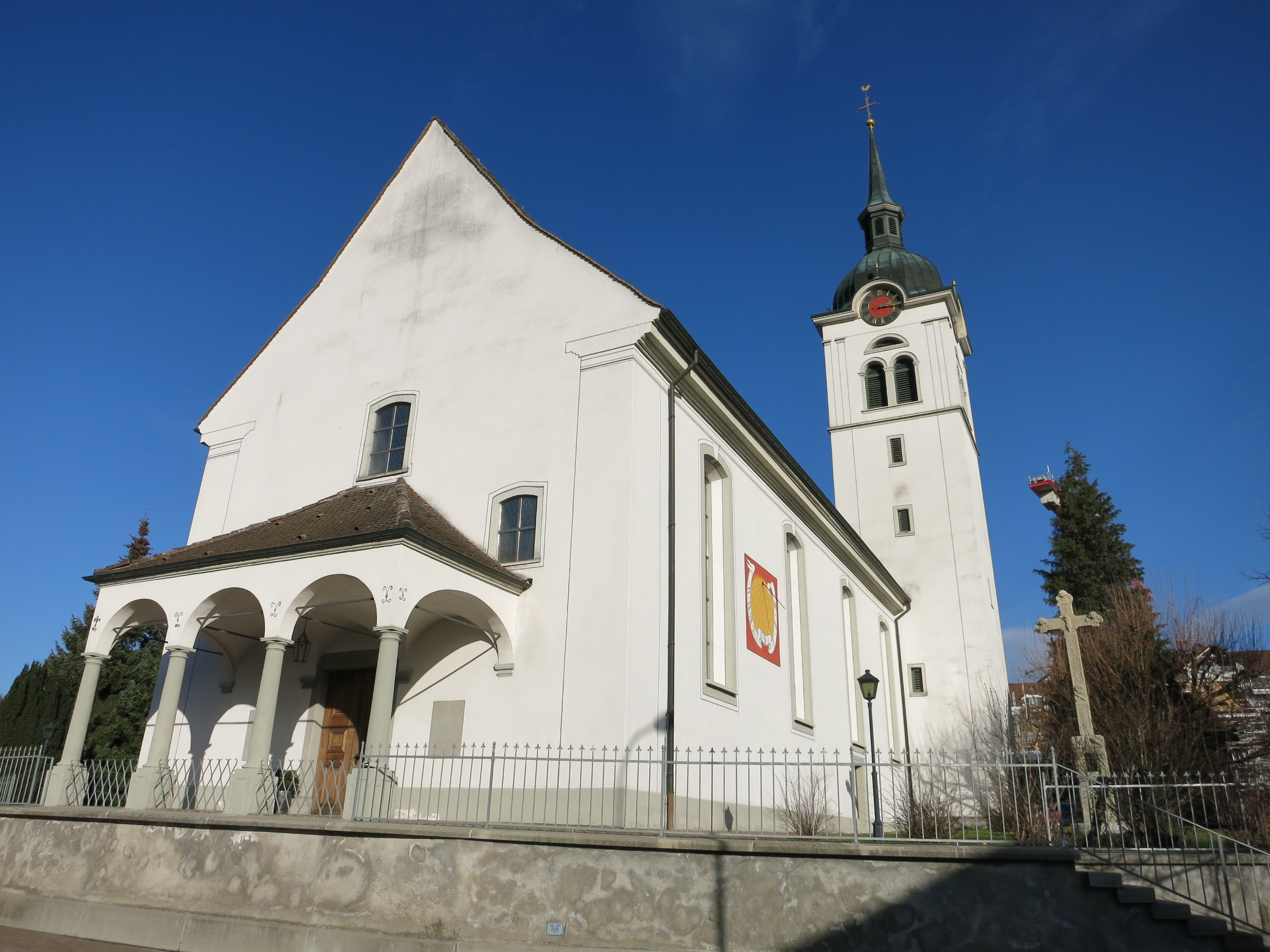 Pfarrkirche, Oberlunkhofen AG, Schweiz